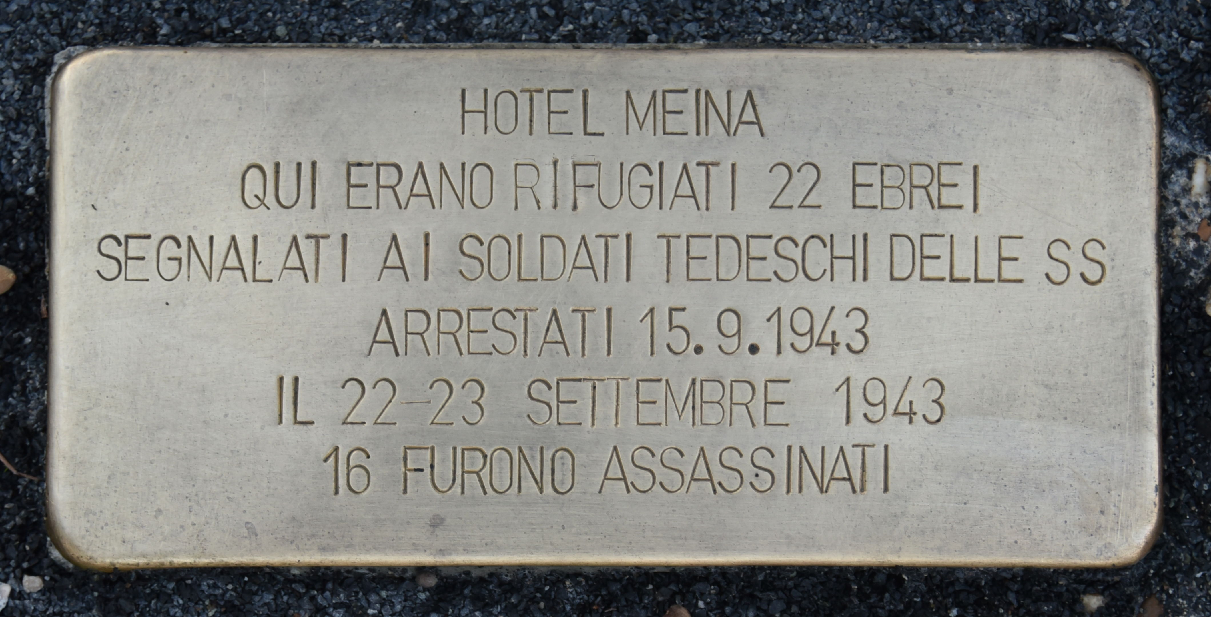 Stolperstein Hotel Meina